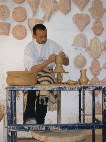 Photographie personnelle prise en décembre 2004, d'un potier de Guellala à Djerba façonnant une poterie d'argile en utilisant un tour.